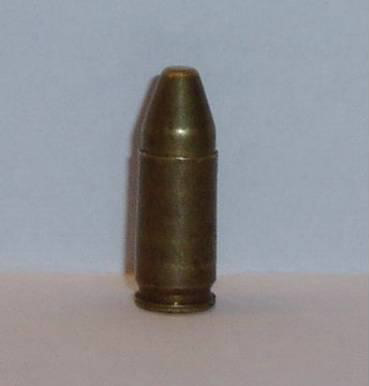 Italian pistol cartridge